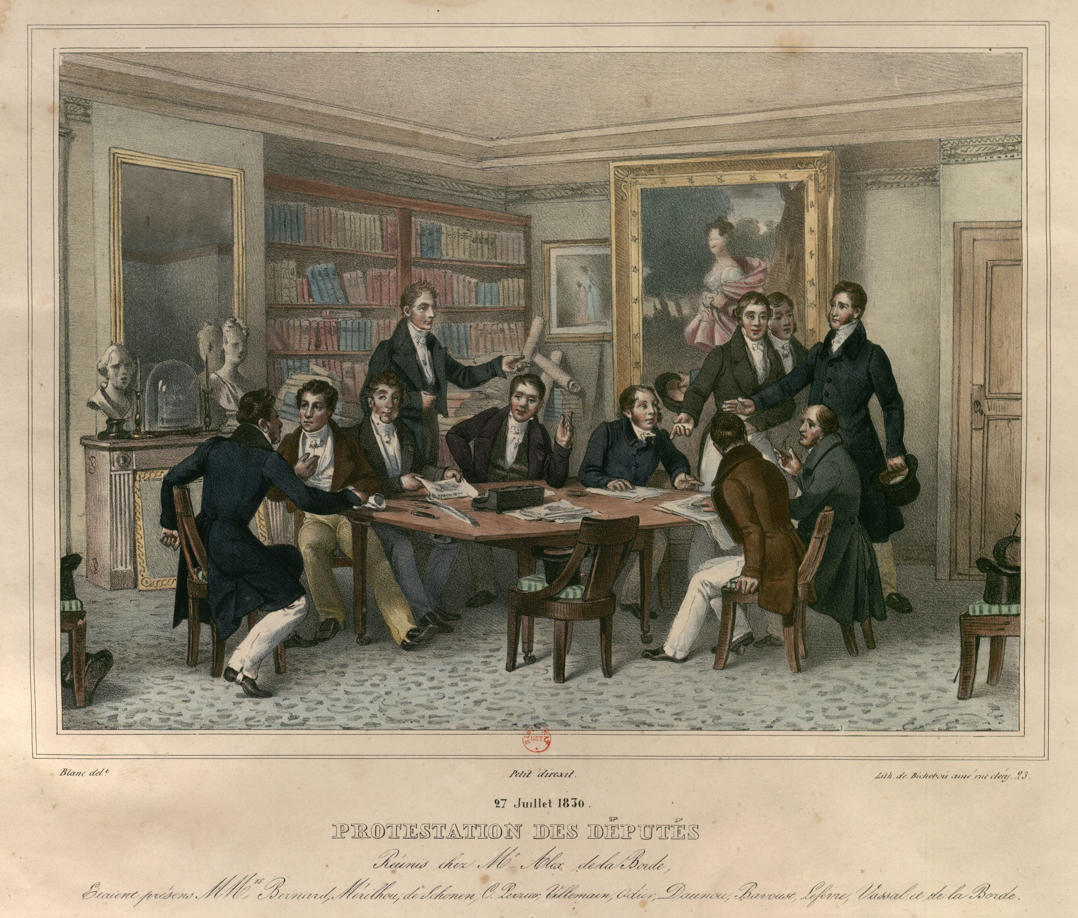 27 juillet 1830. Protestation des députés réunis chez Mr. Alexandre de Laborde. Étaient présents MMrs. Bernard, Joseph Mérilhou, Auguste de Schonen, Casimir Perier, Abel-François Villemain, Antoine Odier, Pierre Daunou, Nicolas Bavoux, Lefèvre, Vassal et de Laborde